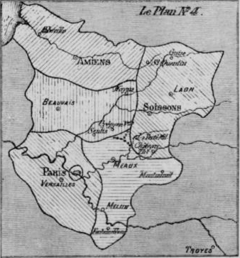 Partage de la Picardie et de l'Ile de France - Comité de Constitution du 10 Décembre 1789